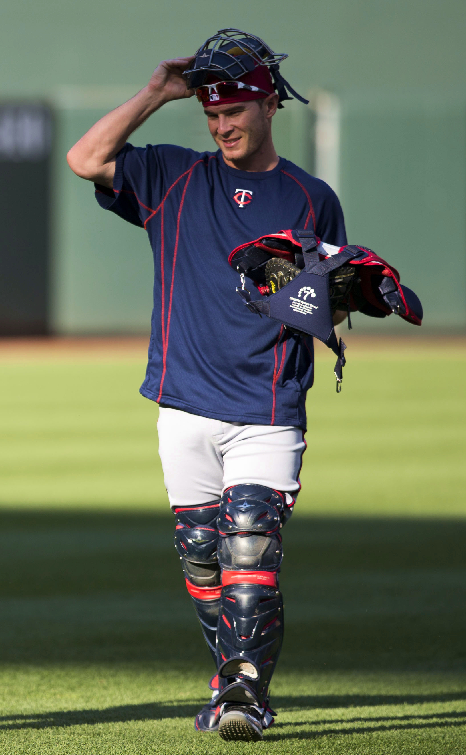 Chris Herrmann